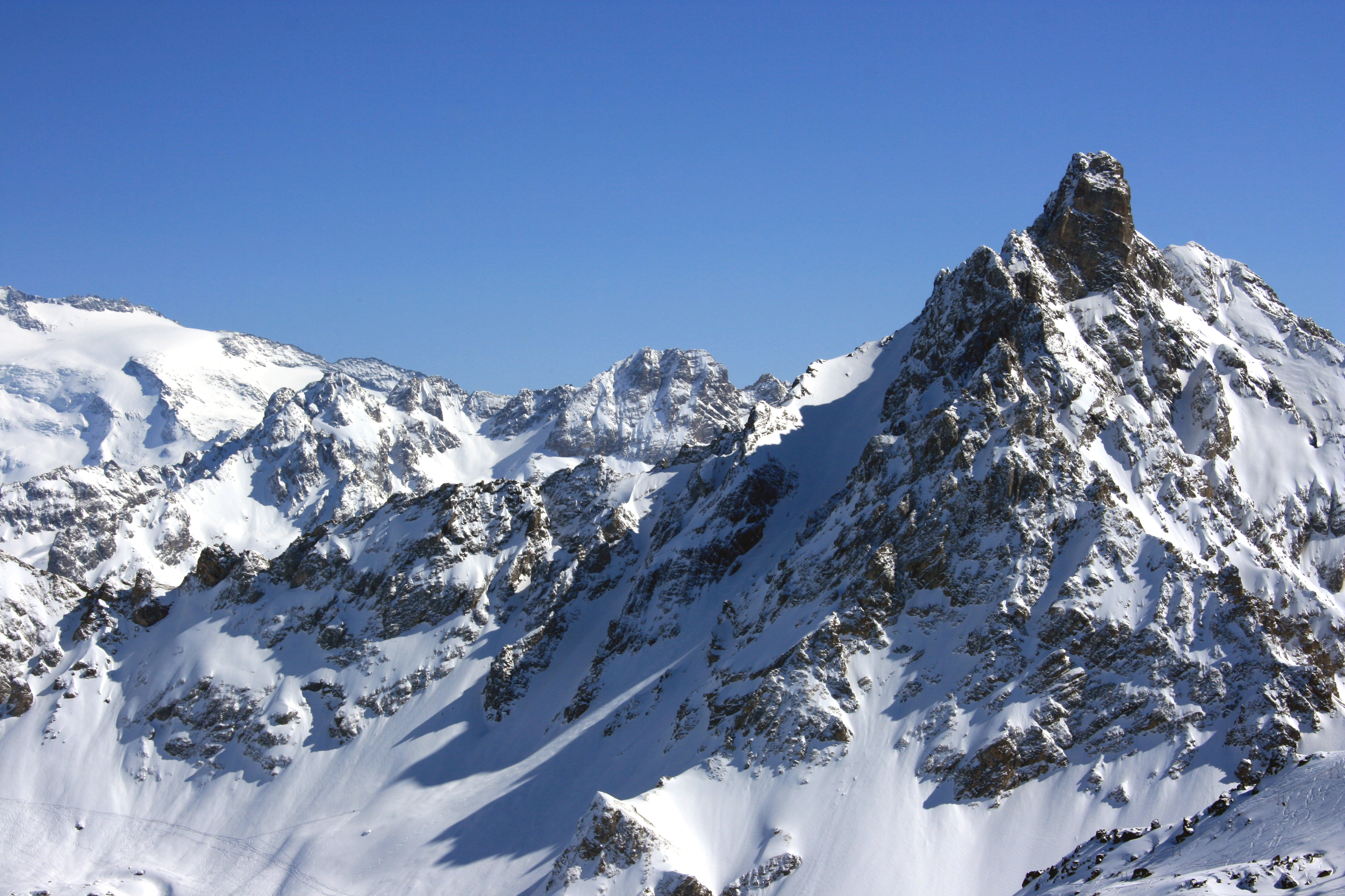 Aiguille du fruit, Savoie, France